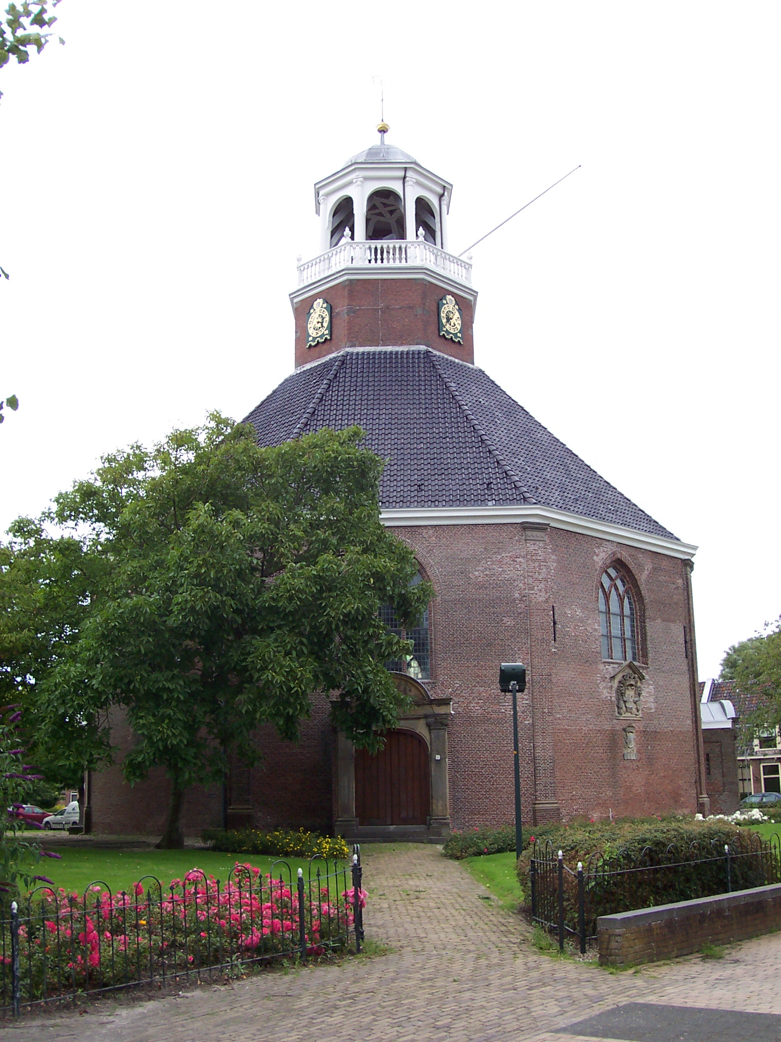 Sint Anne, Van Harenstsjerke